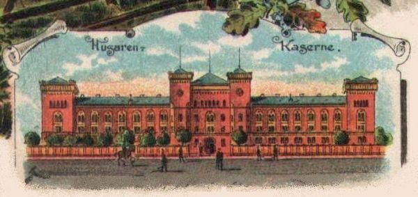 Kaserne des Husaren-Regimentes „König Humbert von Italien“ (1. Kurhessisches) Nr. 13 in Frankfurt-Bockenheim, Rödelheimer Landstraße, späterer Standort Dietenhofen. Im Zweiten Weltkrieg wurde die Kaserne durch Fliegerbomben fast völlig zerstört